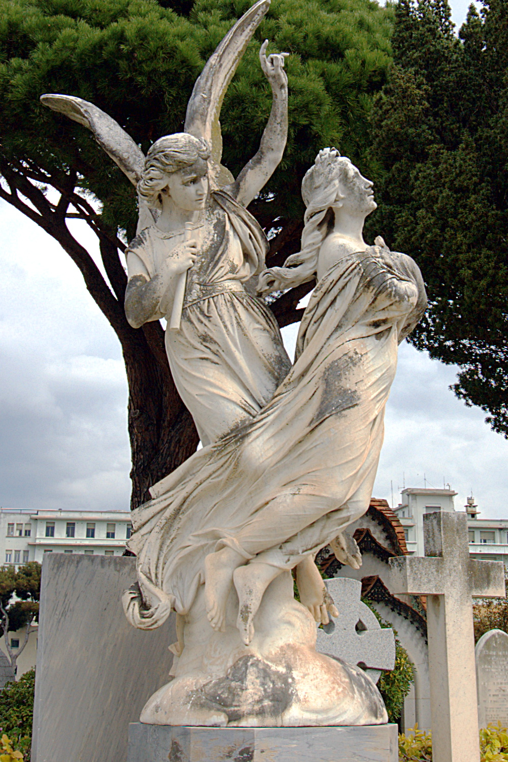 Надгробие на кладбище Гран-Жас.